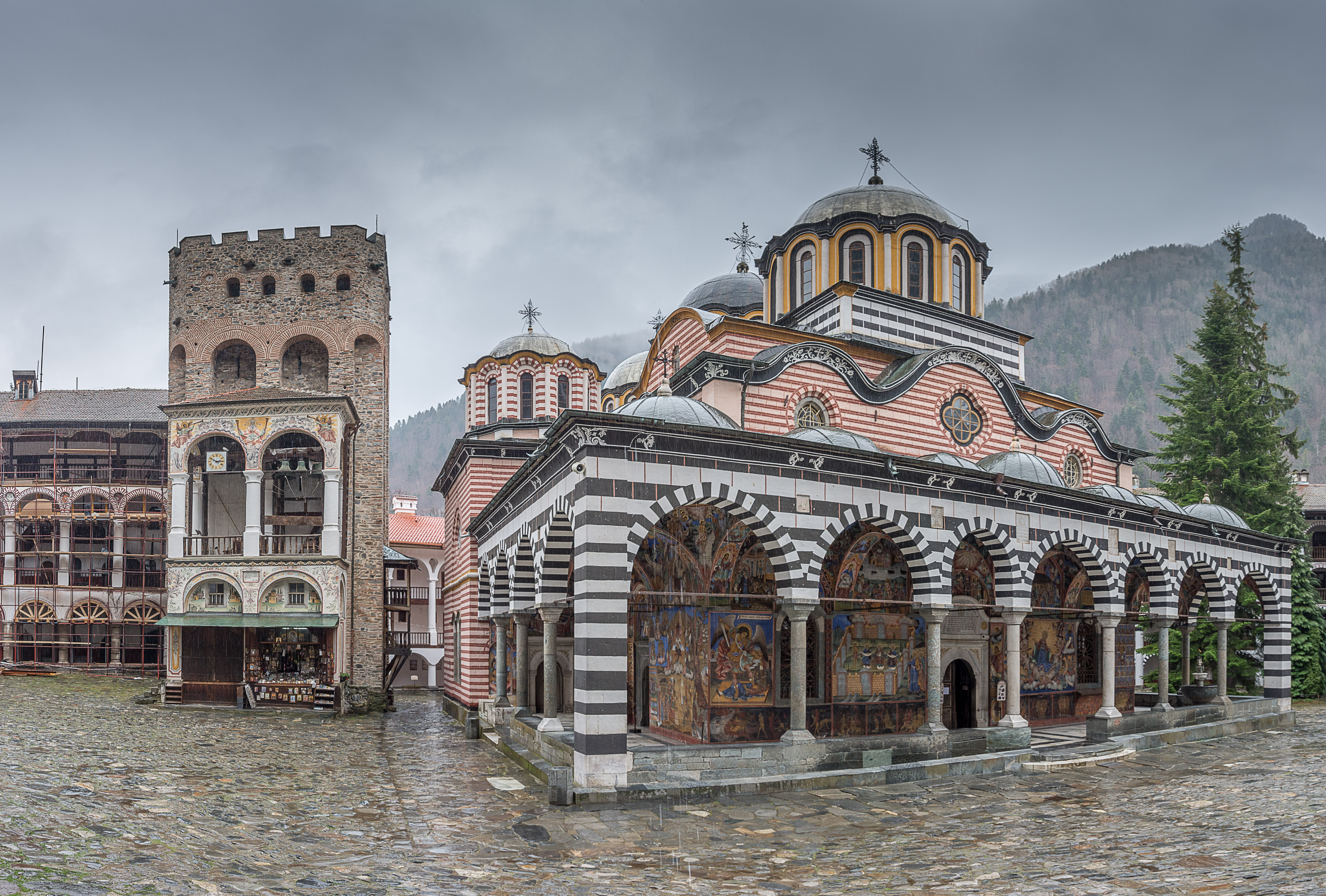 Рилския манастир (Rila monastery - Bulgaria)